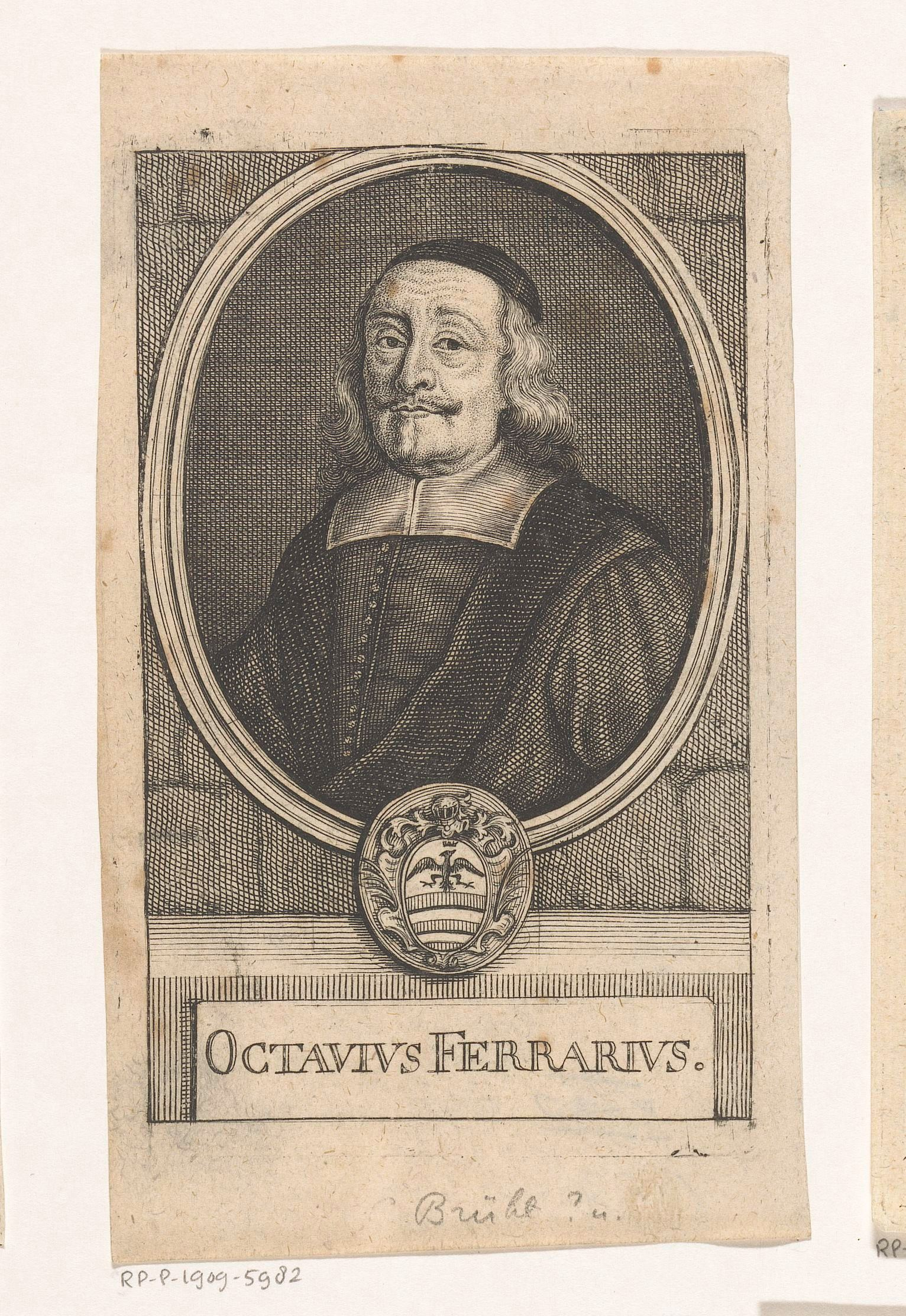 IdentificatieTitel(s): Portret van Ottavio FerrariObjecttype: prent Objectnummer: RP-P-1909-5982Catalogusreferentie: HAB A 6466Opschriften / Merken: verzamelaarsmerk, verso, gestempeld: Lugt 2228VervaardigingVervaardiger: prentmaker: anoniemprentmaker: Johann Benjamin BrühlPlaats vervaardiging: LeipzigDatering: 1711Fysieke kenmerken: gravureMateriaal: papier Techniek: graveren (drukprocedé)Afmetingen: plaatrand: h 137 mm × b 87 mmToelichtingPrent ook gebruikt in: Ferrari, Ottavio. Opera Varia (...) [uitgegeven door:]Johannes Fabricius. Wolfenbüttel: Gottfried Freytag, 1711.OnderwerpWat: historical personsarmorial bearing, heraldryWie: Ottavio FerrariVerwerving en rechtenVerwerving: aankoop 1905Copyright: Publiek domein